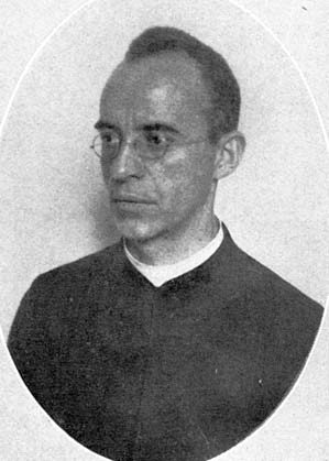 Ferdinand Theißen (1877—1919)